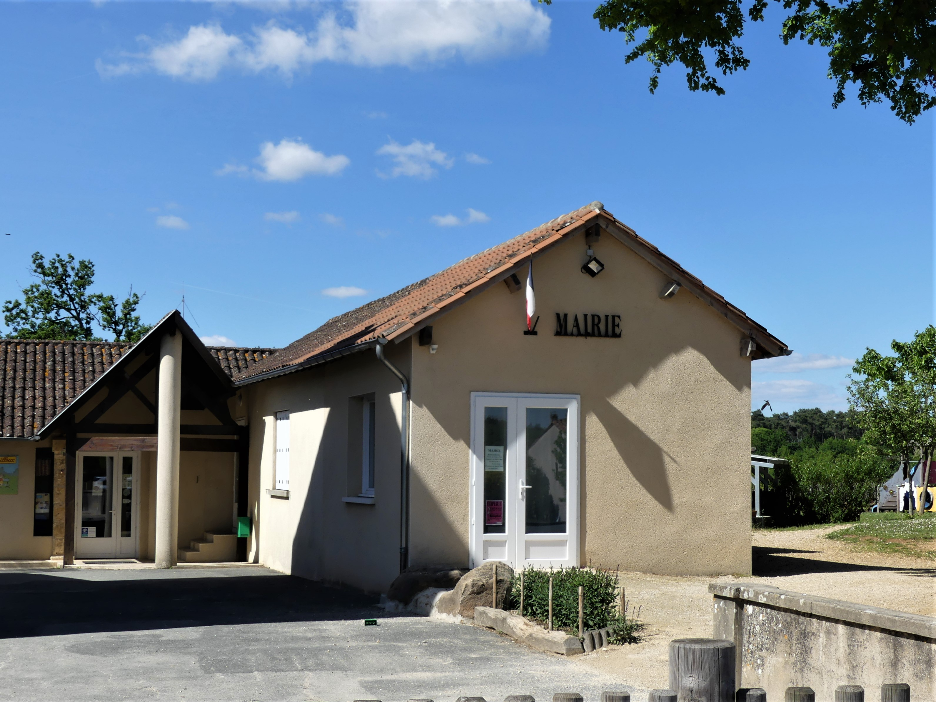 La mairie de Beauregard-et-Bassac, Dordogne, France.